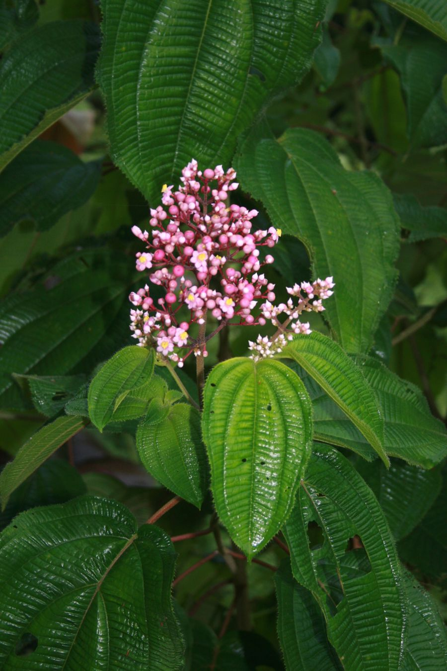 Conostegia subcrustulata, Schwarzmundgewächse (Melastomataceae) - Costa Rica: Prov. Puntarenas, La Gamba NW Golfito, zwischen "Tropenstation La Gamba"/"Estación Biológica La Gamba" und "Esquinas Rainforest Lodge"